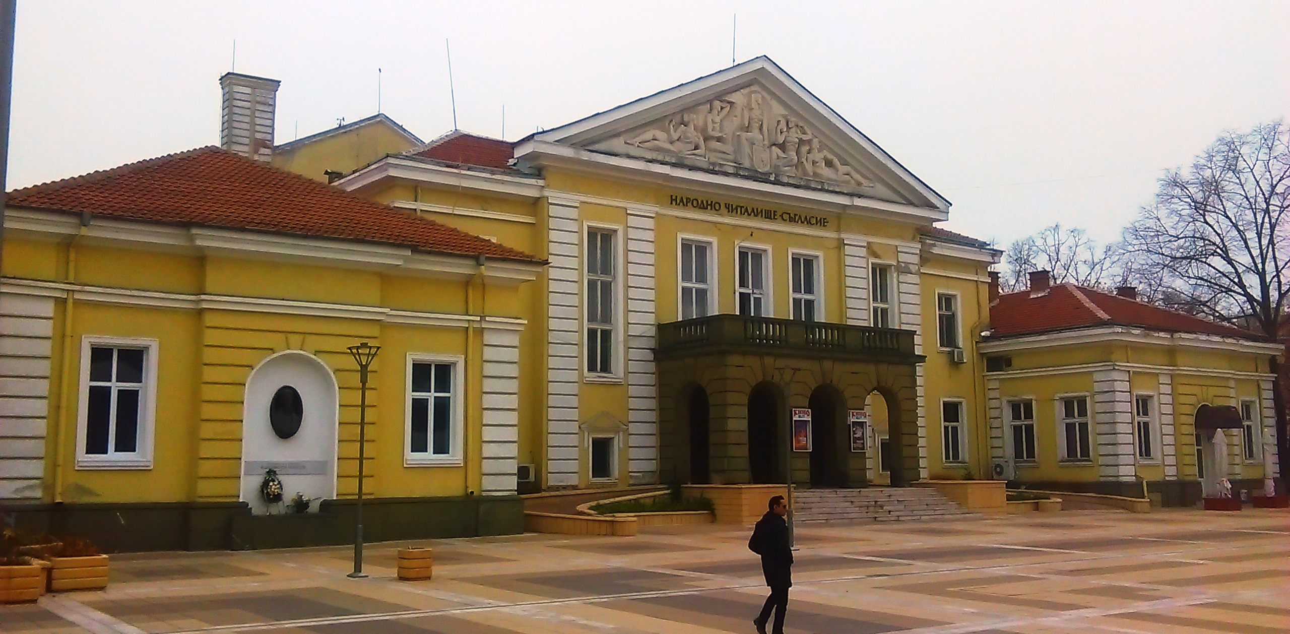 Народно читалище „Съгласие -1862” е основано в метоха при черквата „Св.Георги” през 1862 година от даскал Ради Иванов Колесов.